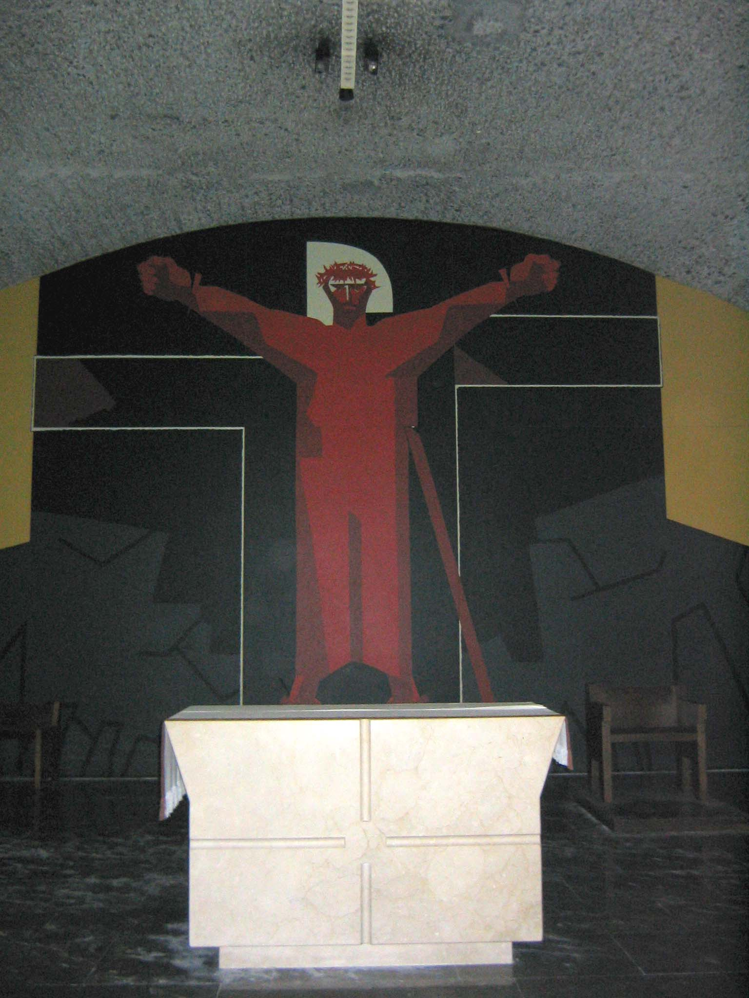 Irudia/Image: Arantzazu santutegia, cripta, Oñati, Gipuzkoa